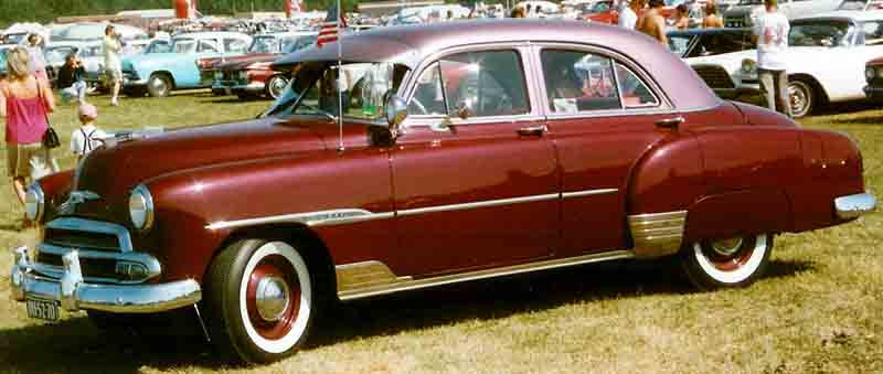 1951 Chevrolet Deluxe Series, Sub-Series Styleline, Model 2103 4-Door Sedan